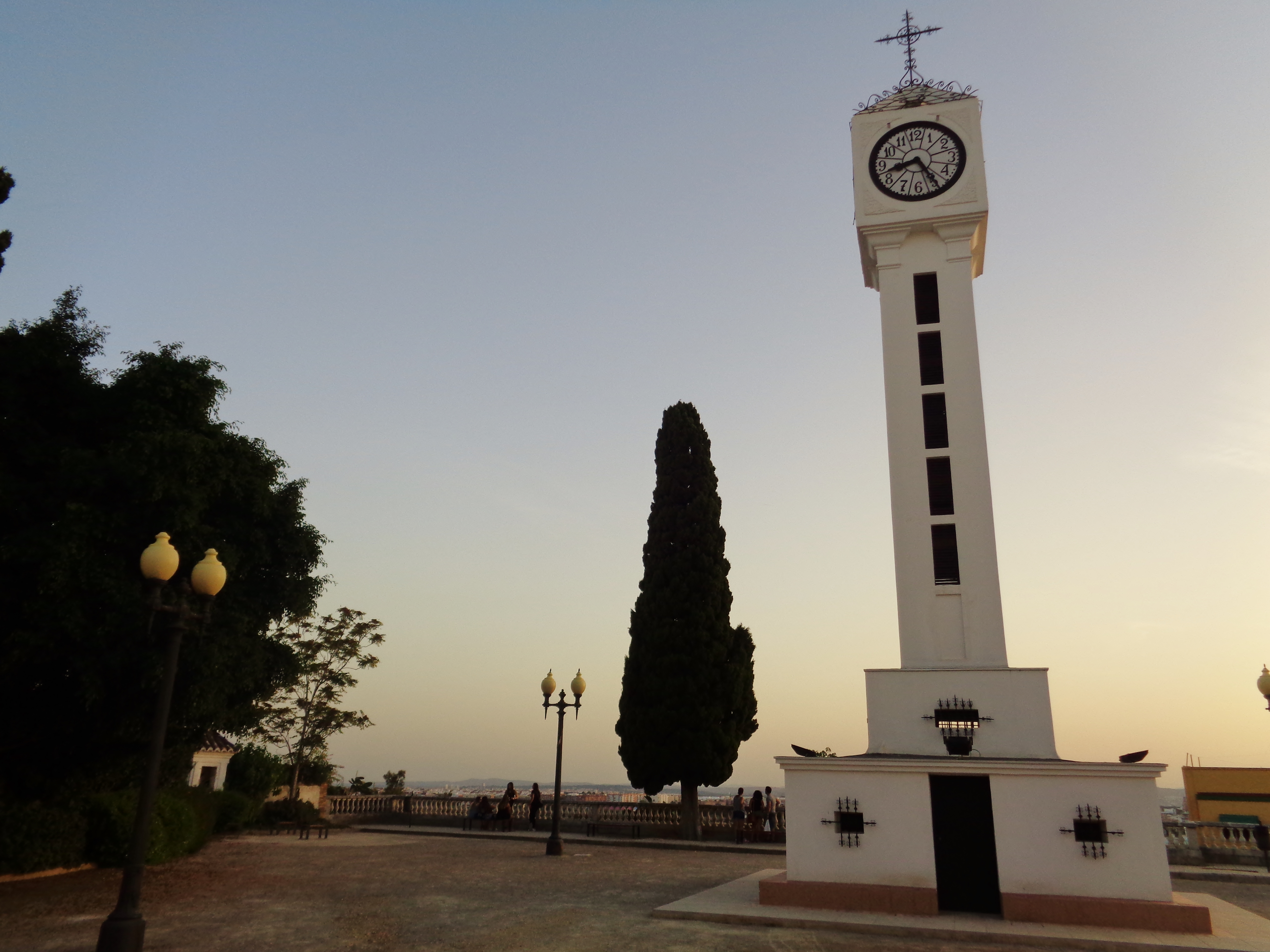 Calvari de Paterna, antic alcàsser.